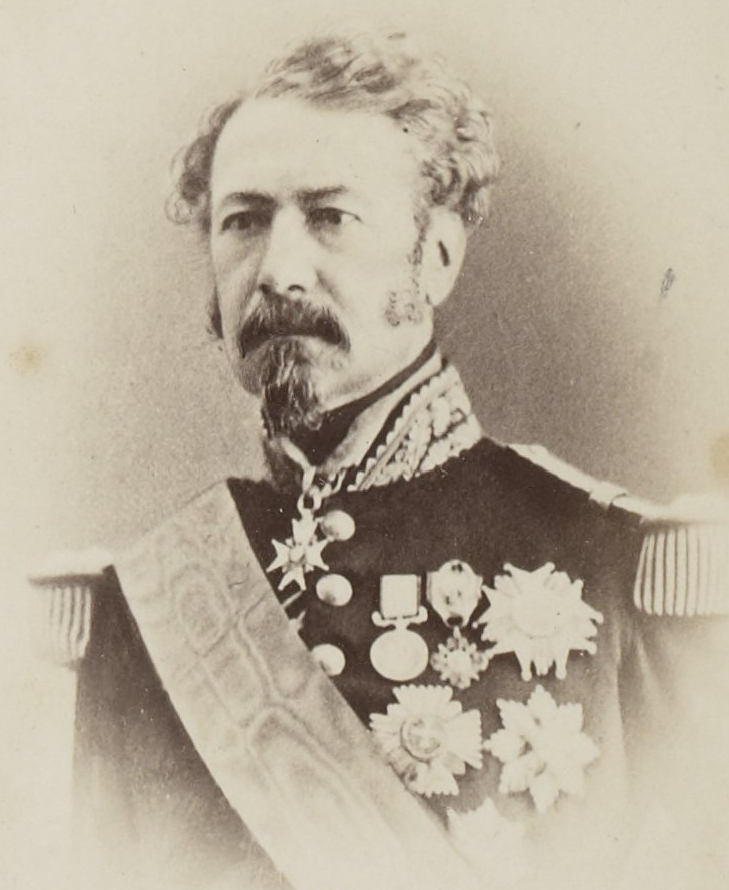 Personnalités françaises et étrangères sous le Second Empire.